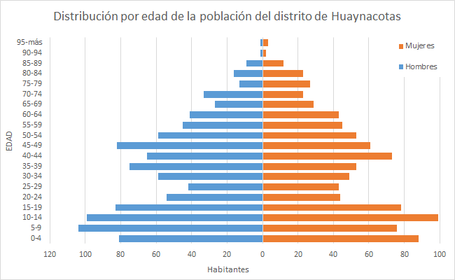 Gráfico poblacional por edades del distrito de Huaynacotas hecho en base a los datos del Censo 2017.